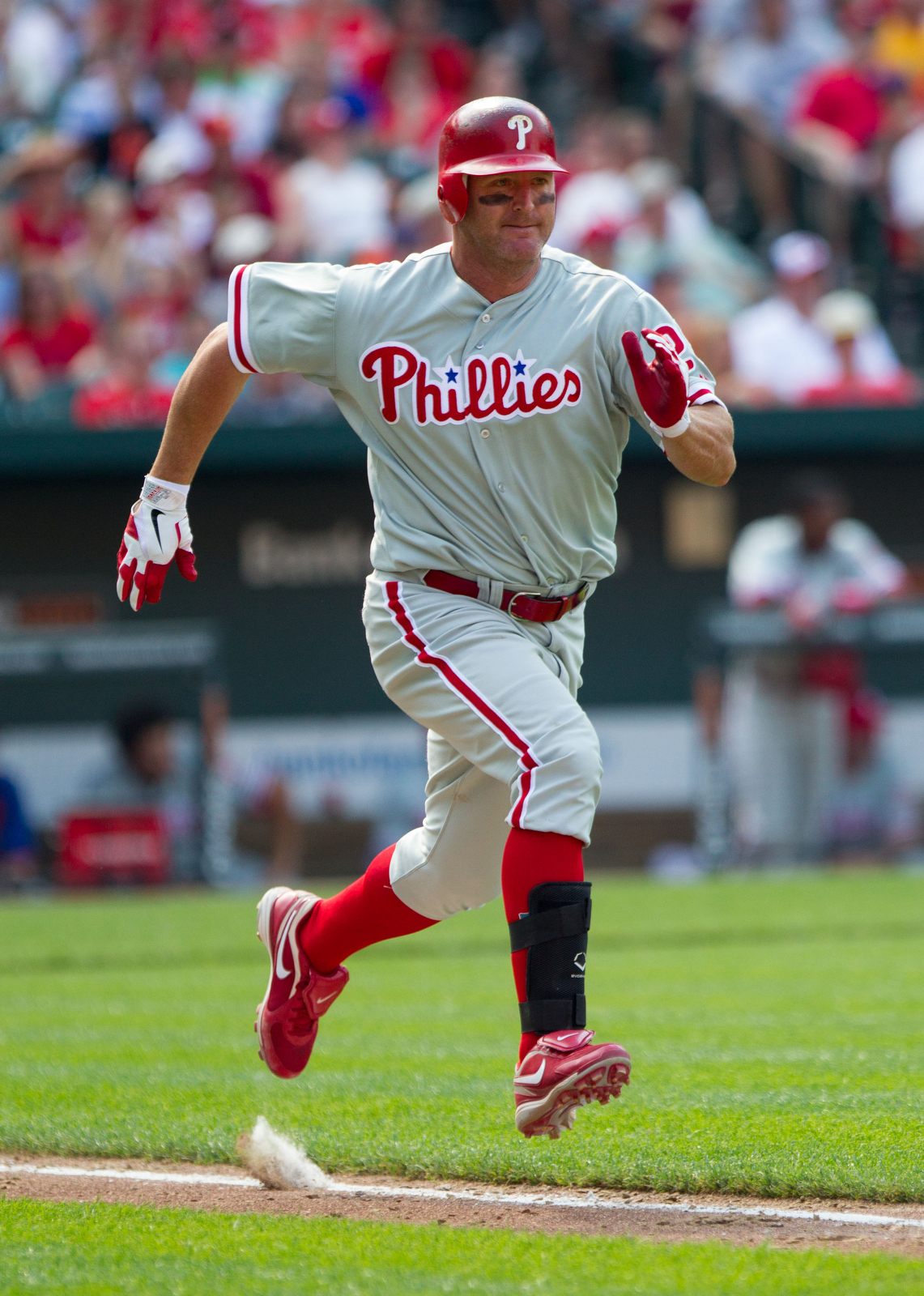 Phillies at Orioles June 10, 2012 Phillies at Orioles 2012